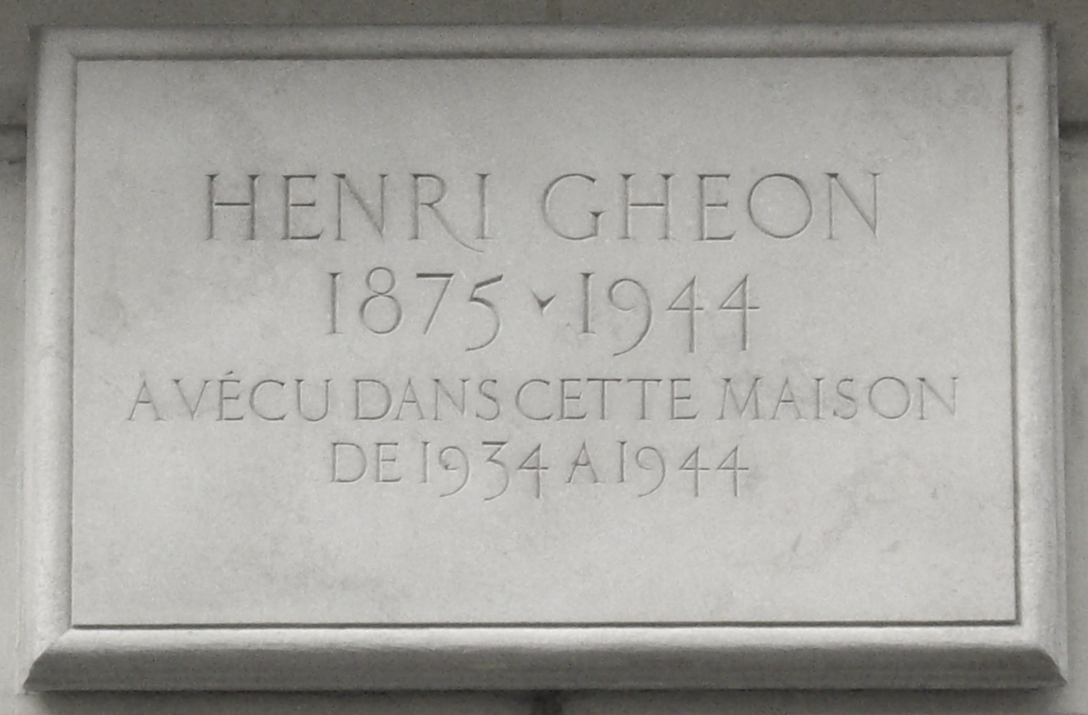 Plaque commémorative, 68 rue Saint-Didier, Paris 16e. « Henri Ghéon, 1875-1944, a vécu dans cette maison de 1934 à 1944. »